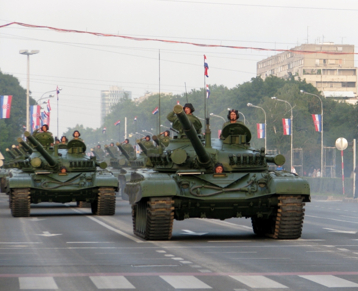 Hrvatski tenkovi M-84 na probi za veliki vojni mimohod u Zagrebu 2015.